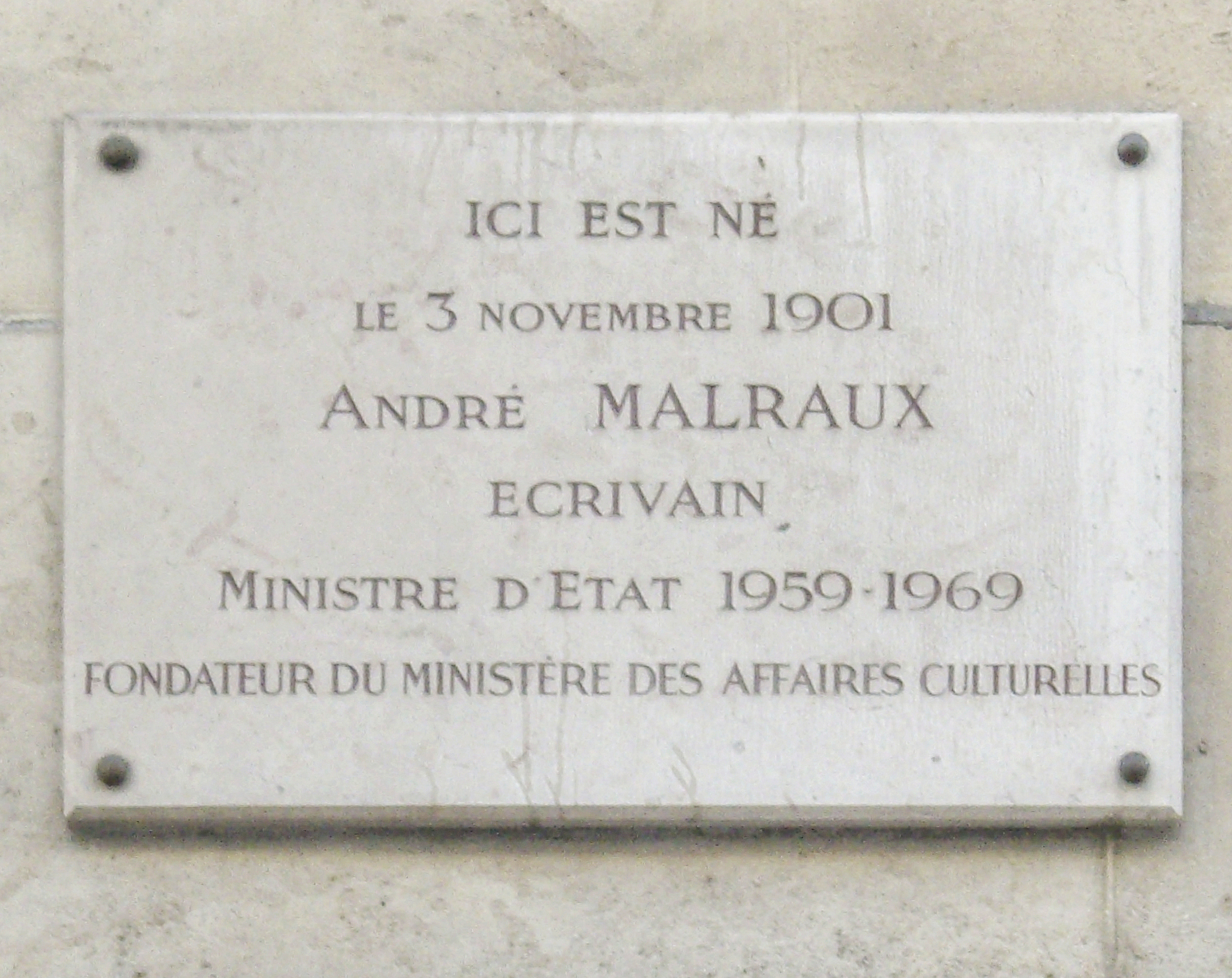 Plaque commémorative, 53 rue Damrémont, Paris 18e. « Ici est né le 3 novembre 1901 André Malraux, écrivain, ministre d'État, 1959-1969, fondateur du ministère des Affaires culturelles. »